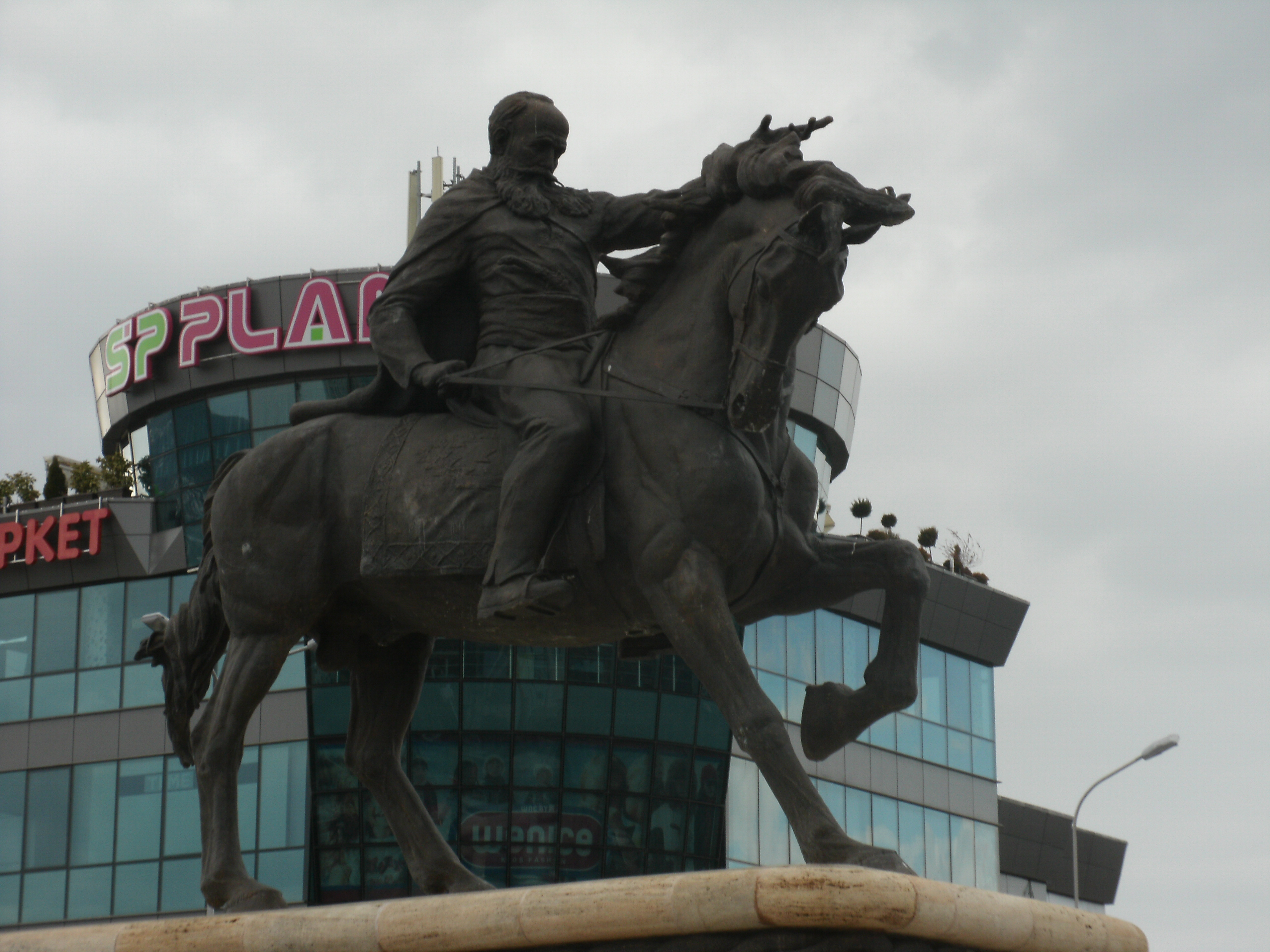 Споменик на Ѓорче Петров во Скопје, Македонија